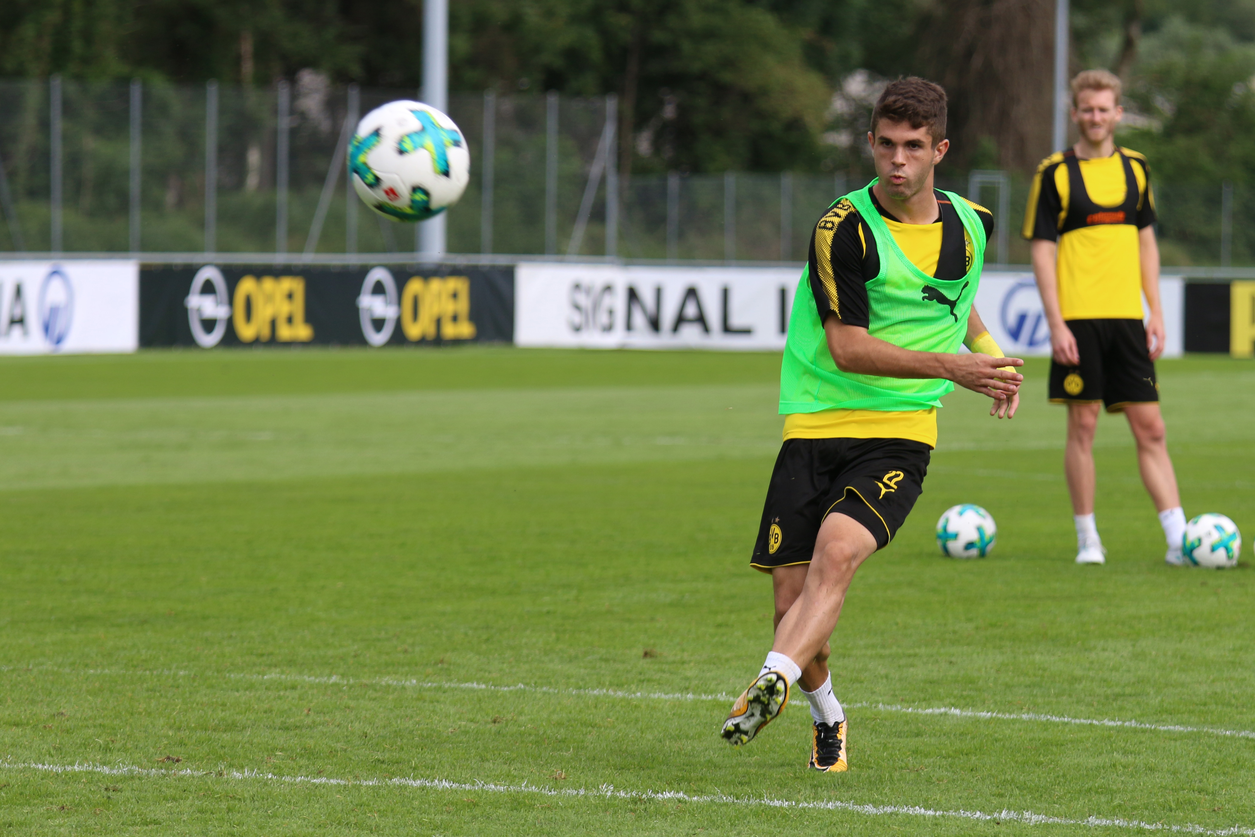 Christian Pulisic im BVB Trainingslager in Bad Ragaz 2017